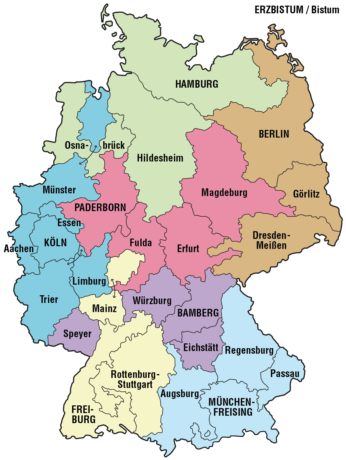 Karte der ERZBISTÜMER und Bistümer in Deutschland